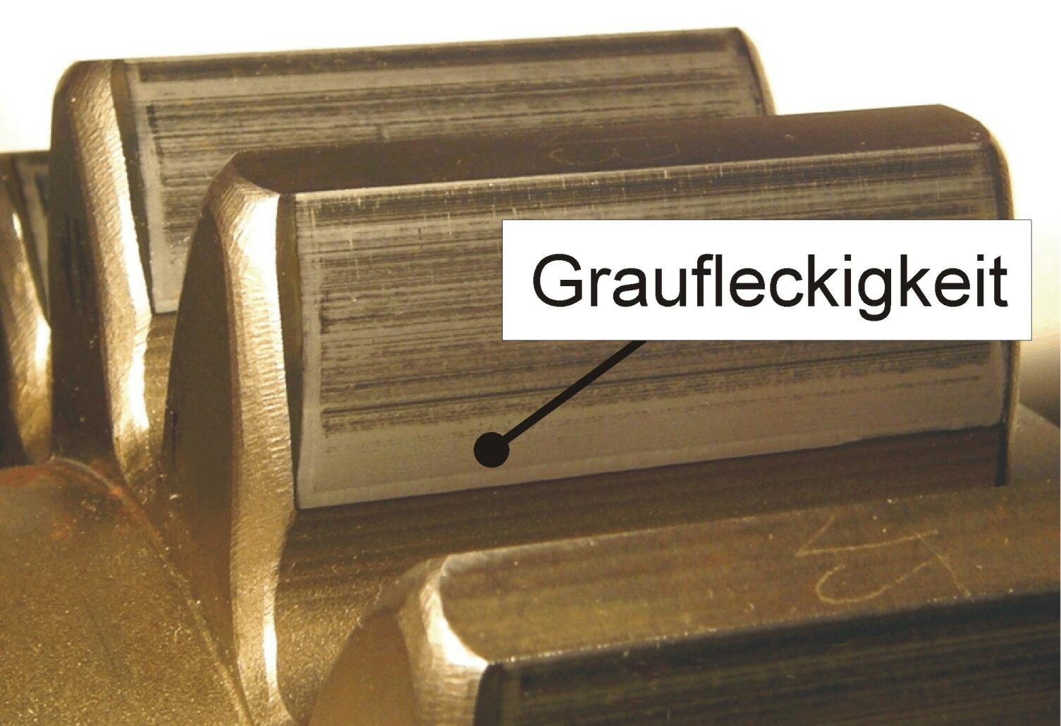 Zahnrad mit Graufleckigkeit Ausschnitt eines Zahnrades (Modul22, 16 Zähne), das auf den Flanken Graufleckigkeit zeigt